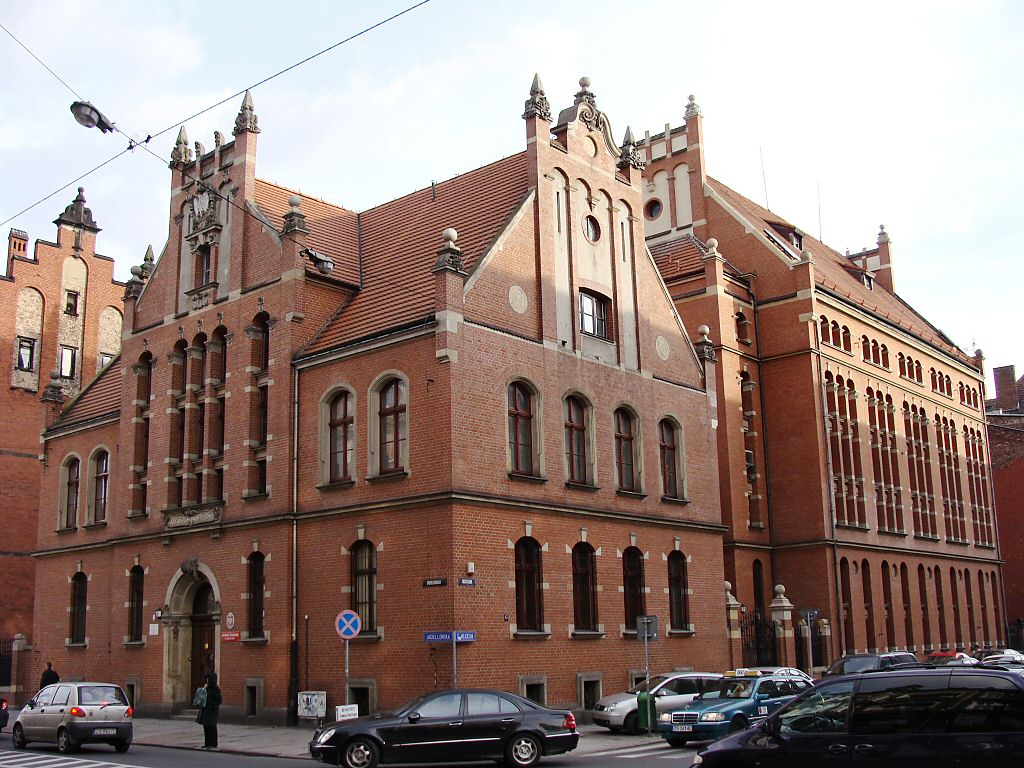 Budynek Archiwum Państwowego przy ul. Św. Wojciecha 12 w Szczecinie - obiekt zabytkowy